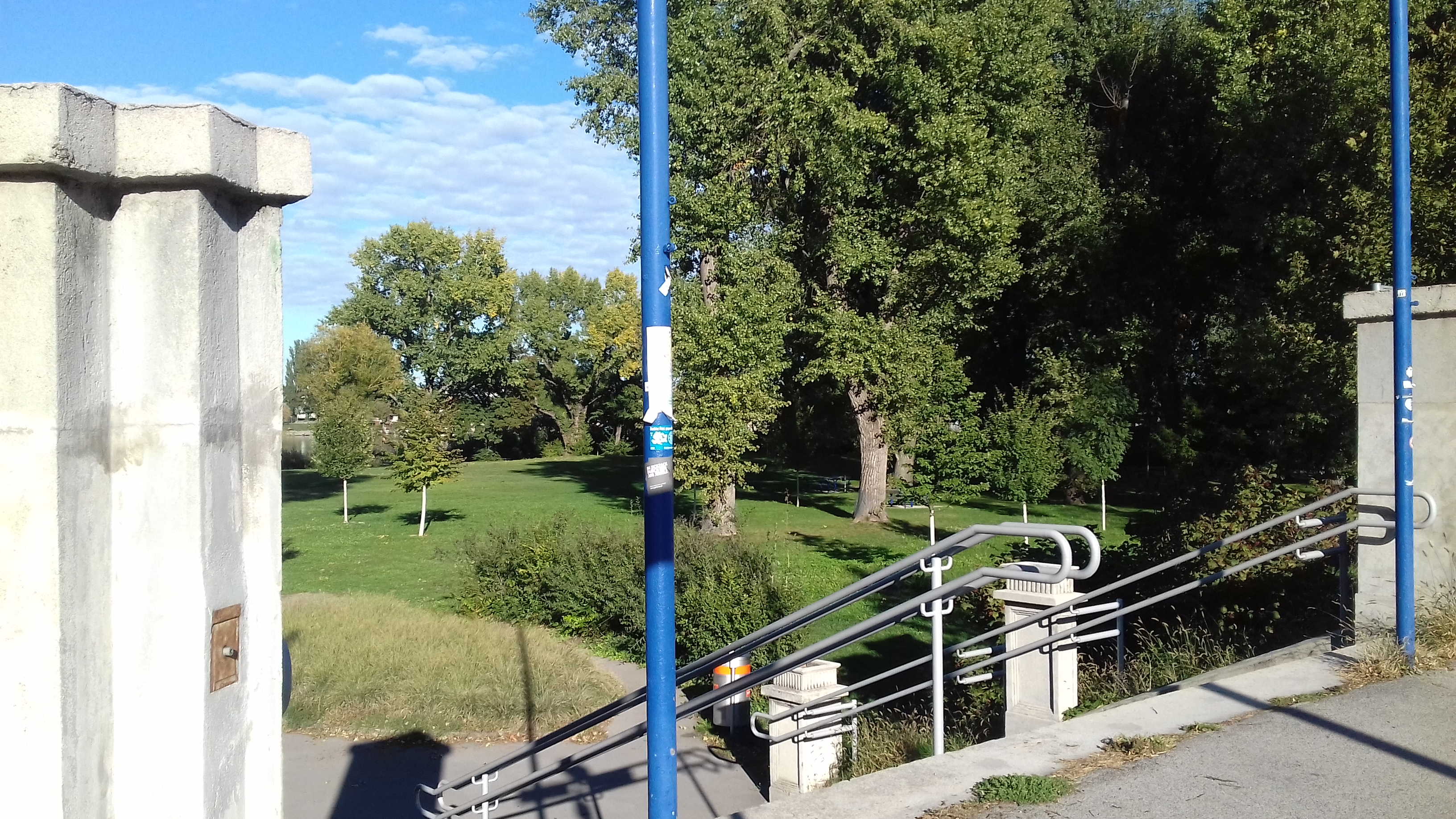 Stiegenabgang zum Arbeiterstrand (ArbeiterInnenstrand), dem ehemaligen Arbeiterstrandbad, das zu einer Lagerwiese umgewandelt wurde. Diese Datei wurde im Rahmen von WikiDaheim 2018 in Österreich erstellt und hochgeladen.Sie wurde dem Themenbereich Öffentliche Güter zugeordnet.